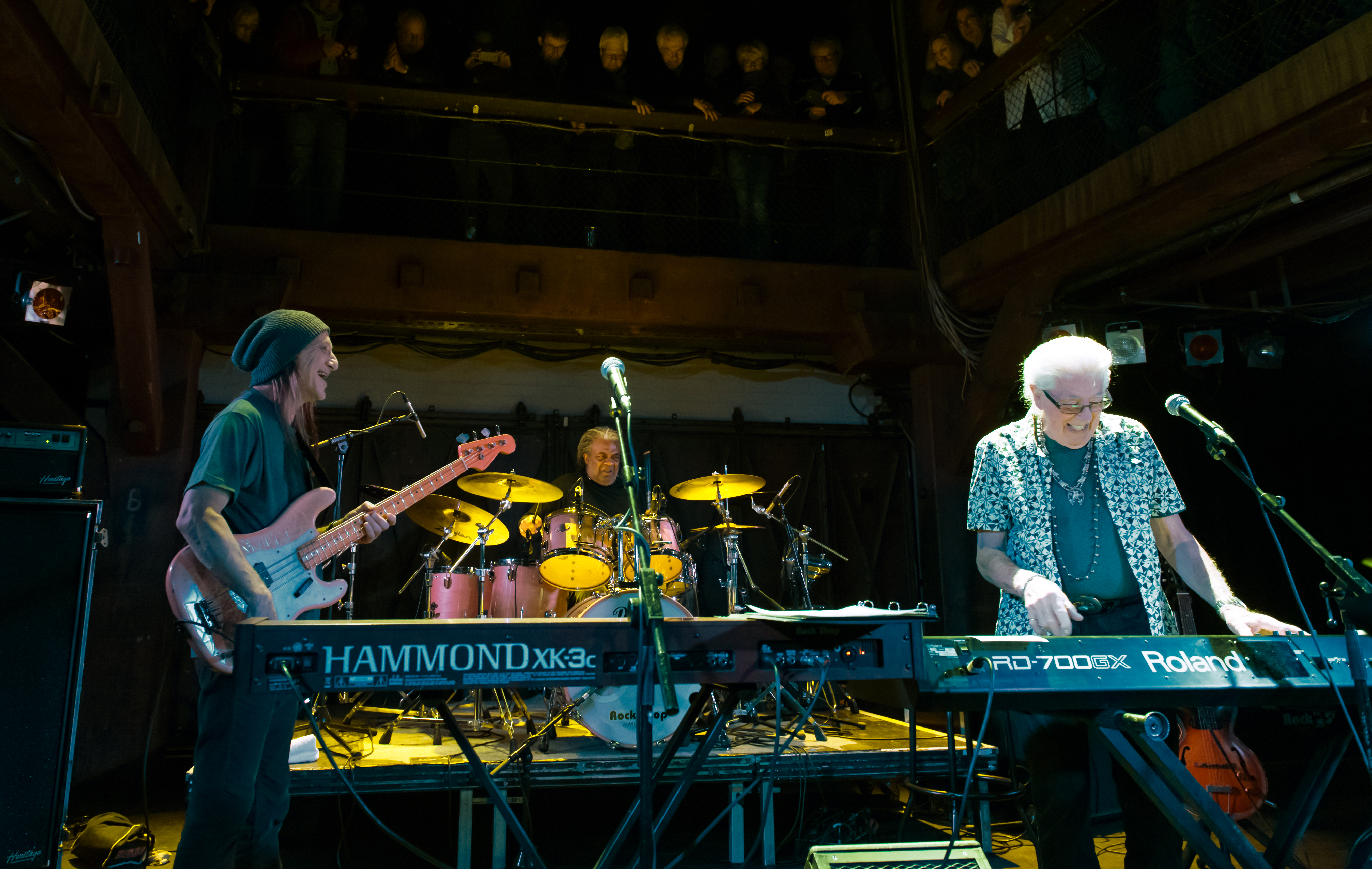 John Mayall mit Band (v.l.n.r. Greg Rzab, Jay Davenport und John Mayall) in der Fabrik Hamburg 2017